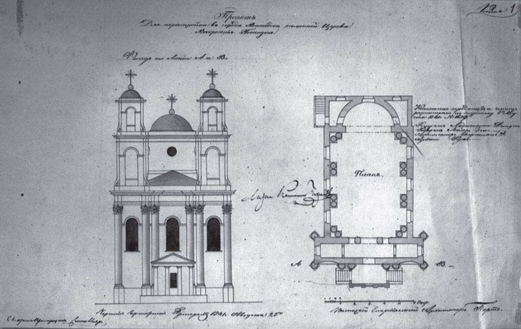 Беларуская (тарашкевіца): Віцебск (Viciebsk), рог пляцу Рынку (plac Rynak) і вуліцы Ўзгорскай (vulica Ŭzhorskaja). Царква Ўваскрасеньня Хрыстова (Рынкавая)